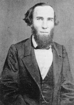 Brigadier General Leroy Pope Walker